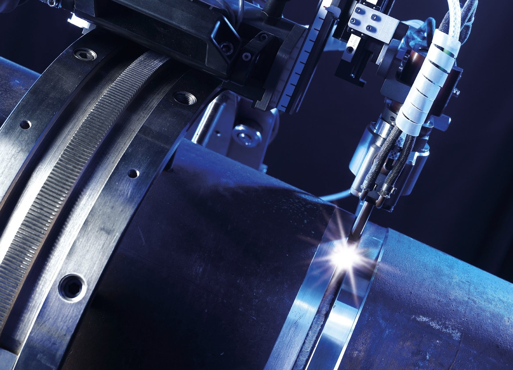 Tête de soudage ouverte type chariot type Polysoude.